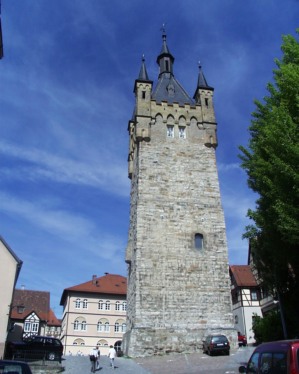 Bilder aus Bad Wimpfen (Blauer Turm)